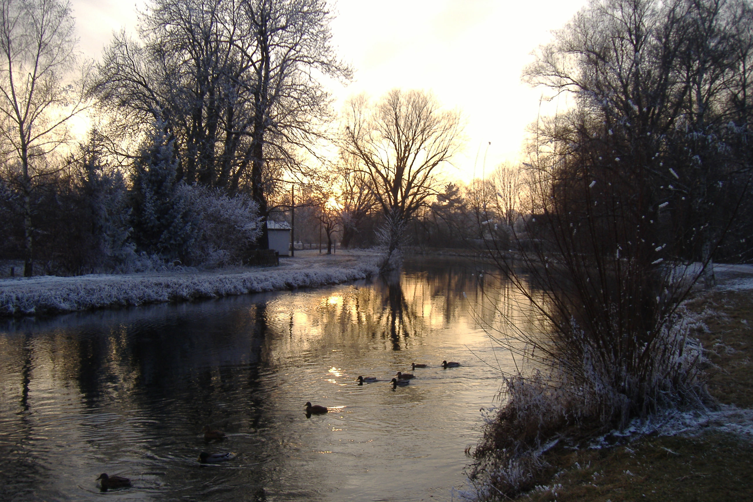 Mülbach